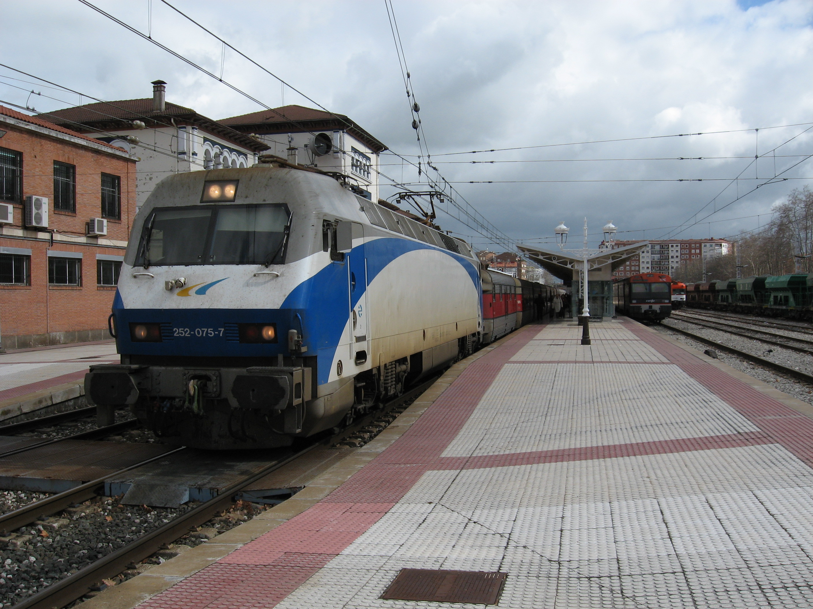 Desc: Talgo Covadonga, esperando para salir de la estación de Vitoria